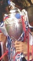 coppa di Francia particolare di 100px